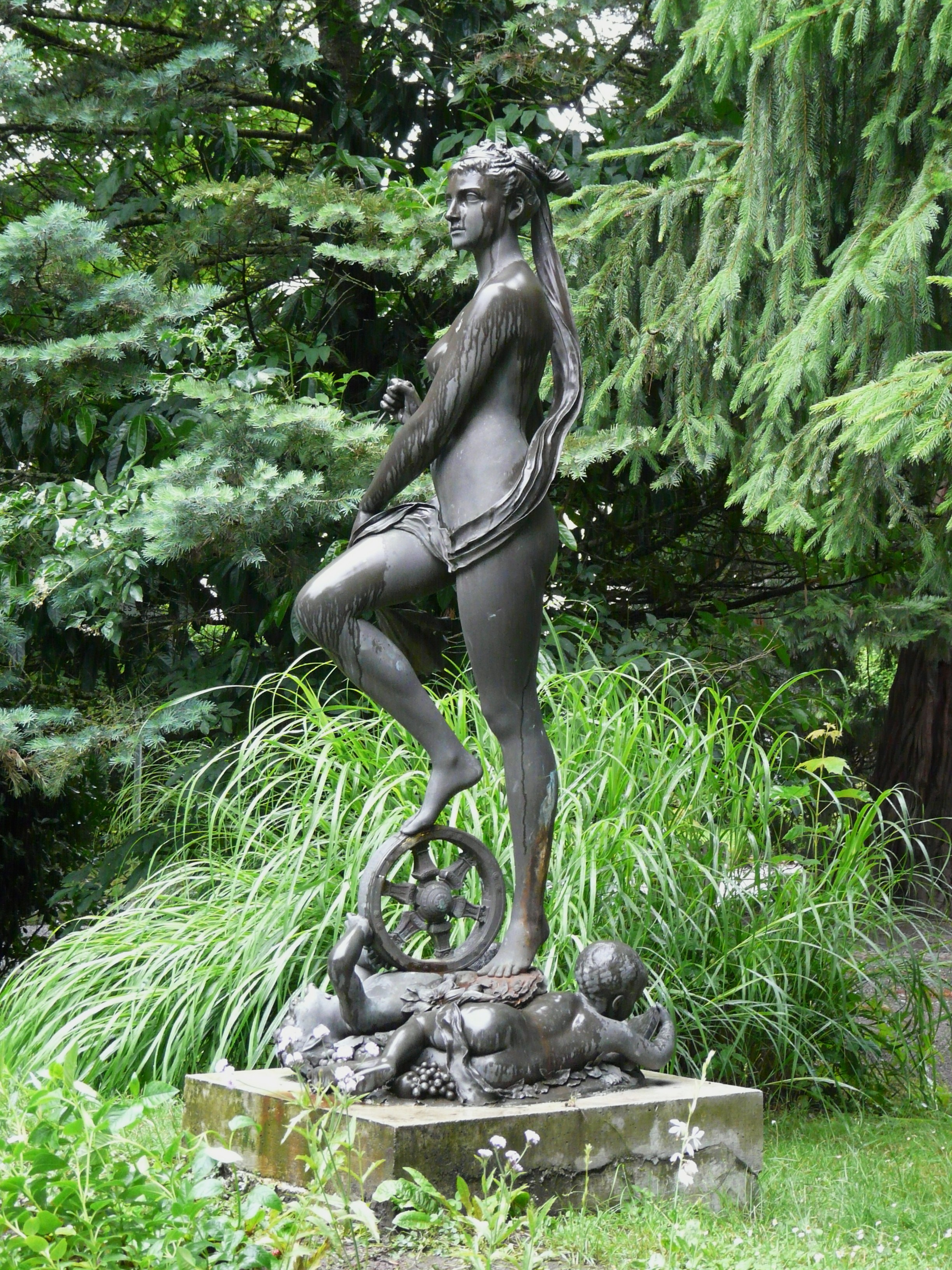 Statue représentant la Fortune, œuvre d'Ernest Christophe, parc du Casino de Bagnères-de-Luchon, Haute-Garonne, France.